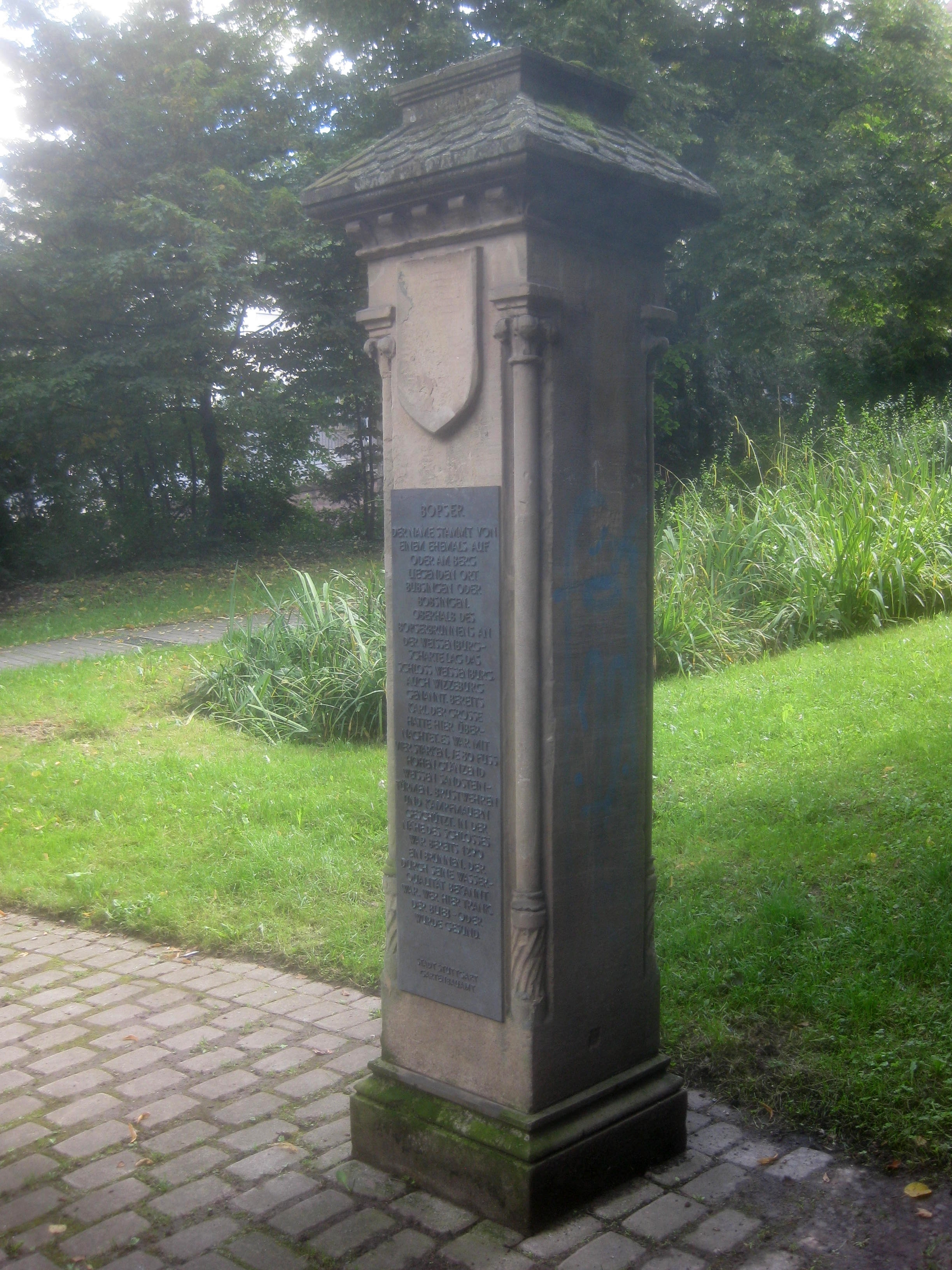 Bopsergedenkstein, Sandsteinpfeiler mit zwei bronzenen Erklärungstafeln zum Bopser und dem Bopserbrünnele, Stuttgart-Süd, Bopseranlage, beim Bopserbrunnen.